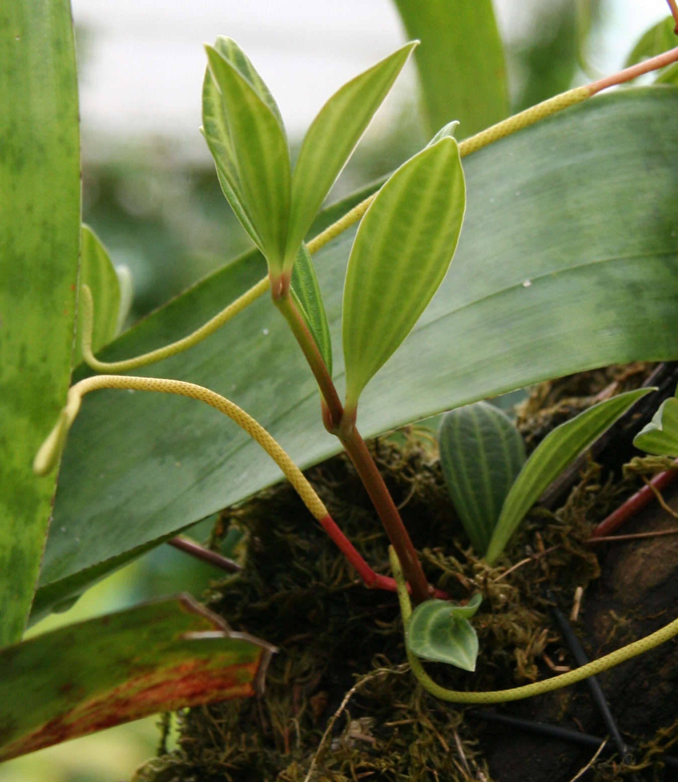 Peperomia cuspidilimba im Botanischen Garten Dresden